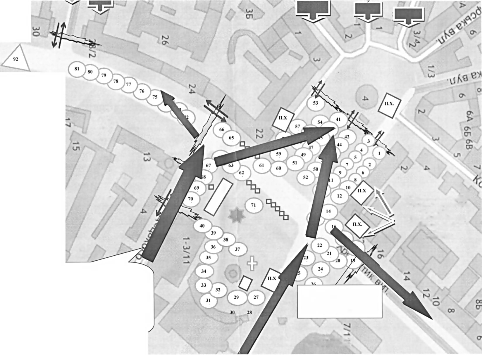 Оперативний задум нейтралізації екстремістської діяльності учасників протестних заходів. Спецоперація «Бумеранг» в межах операції «Хвиля». Карта до плану операції. Опубліковано Геннадієм Москалем 24 лютого 2014 року.